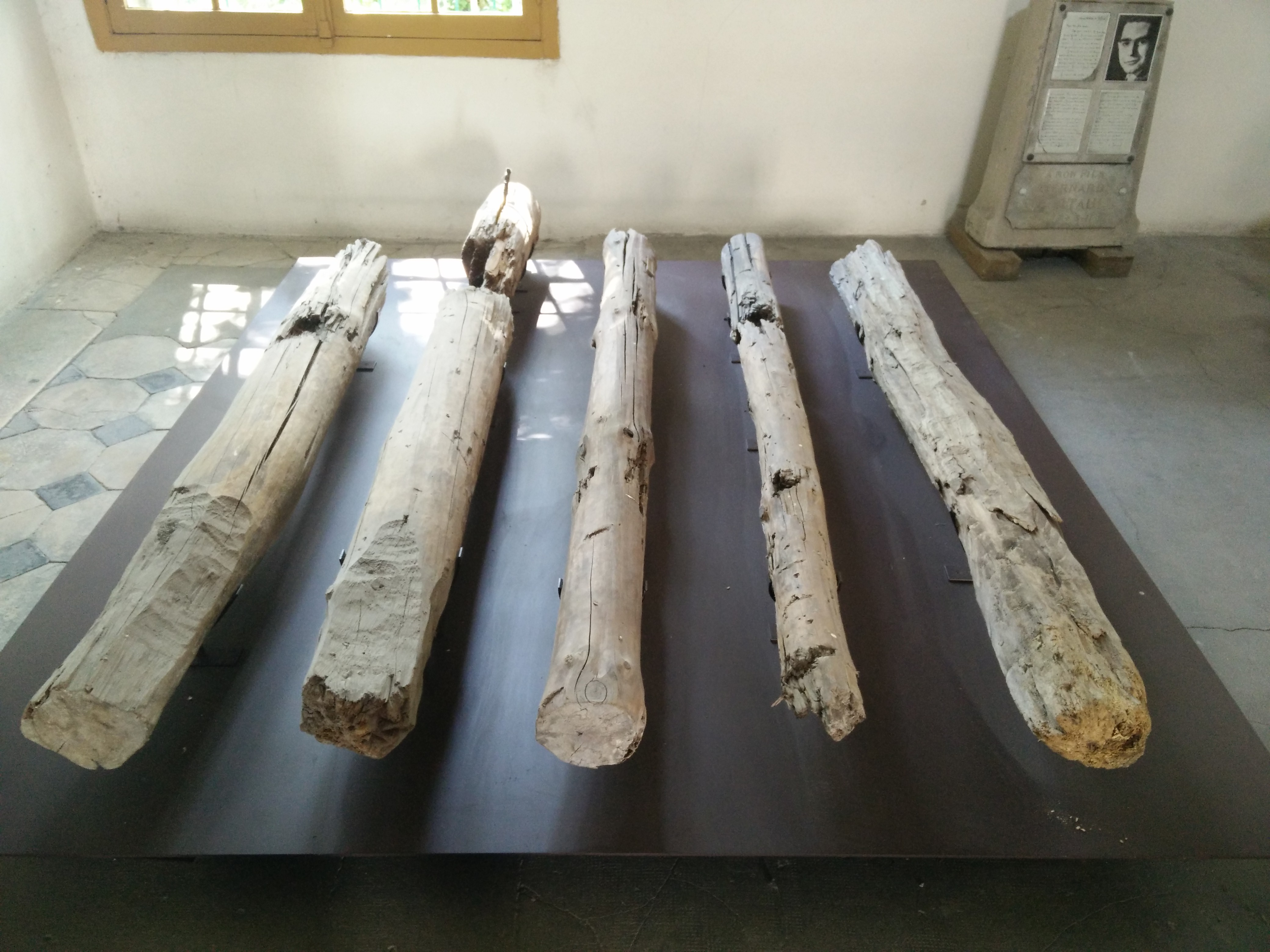 Poteaux d'exécution exposés au mont Valérien, dans la chapelle des fusillés.